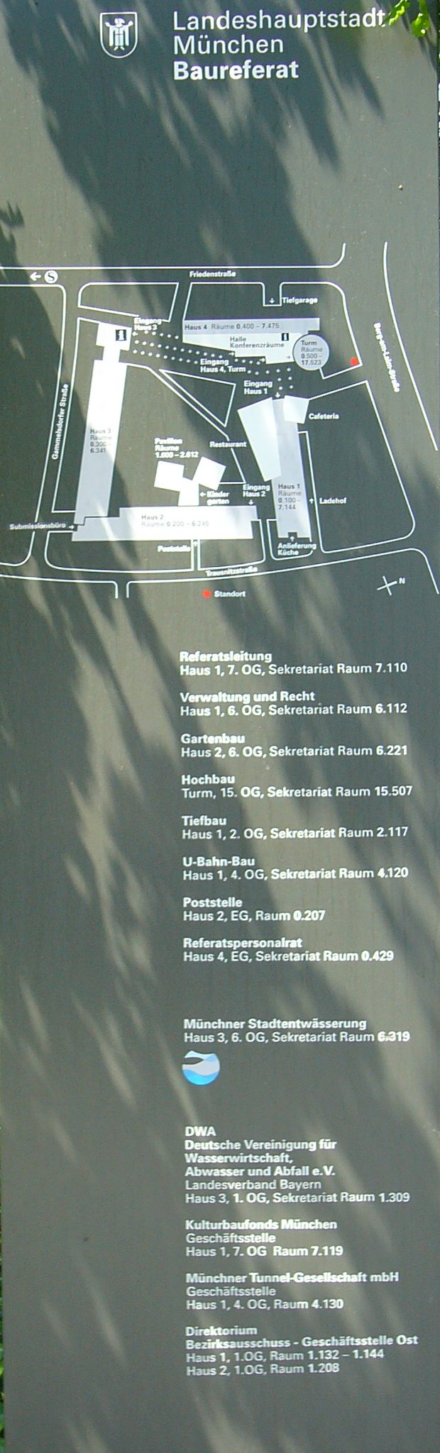 Technisches Rathaus in München, Germany